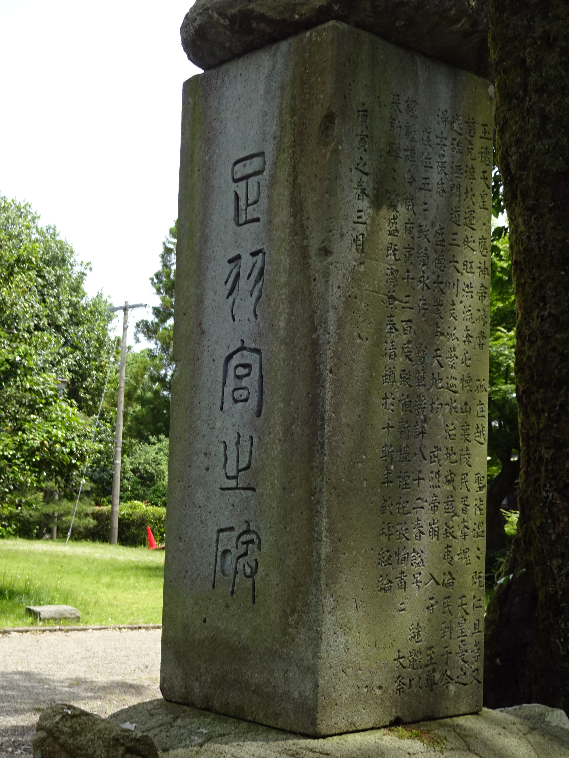 足羽宮碑